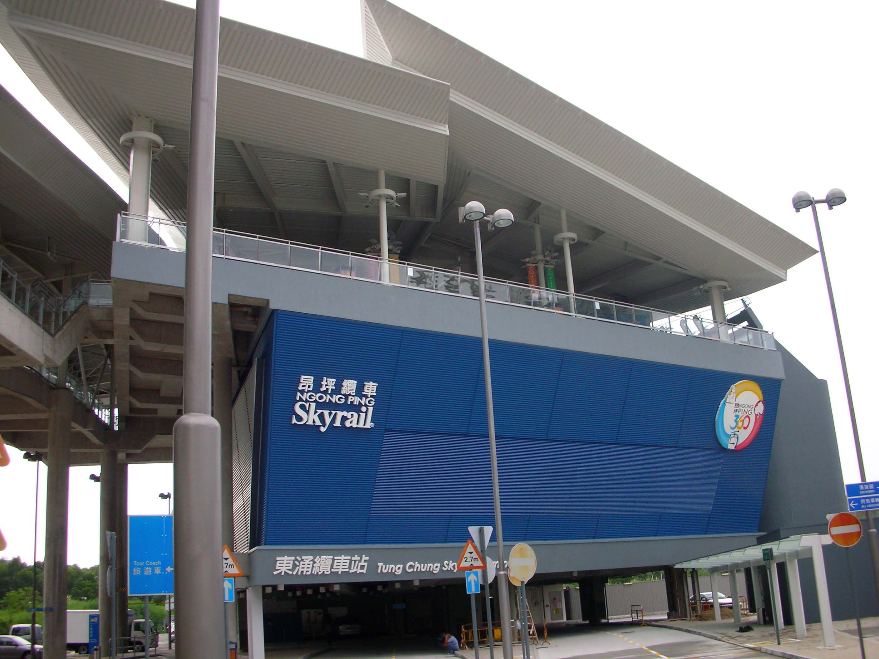 Ngong Ping 360 Hong Kong, Tung Chung Terminal (Outlook)